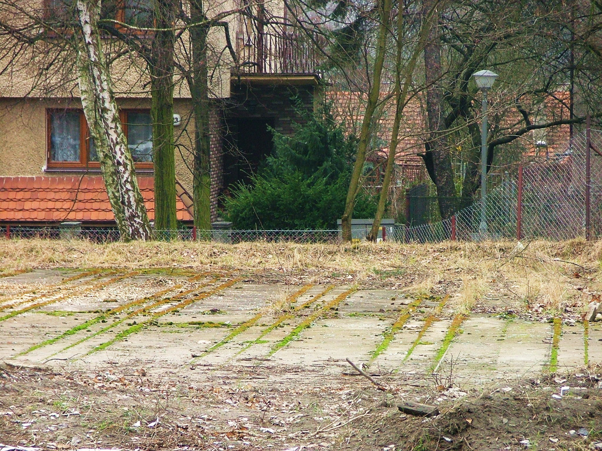 Ulica Litewska.